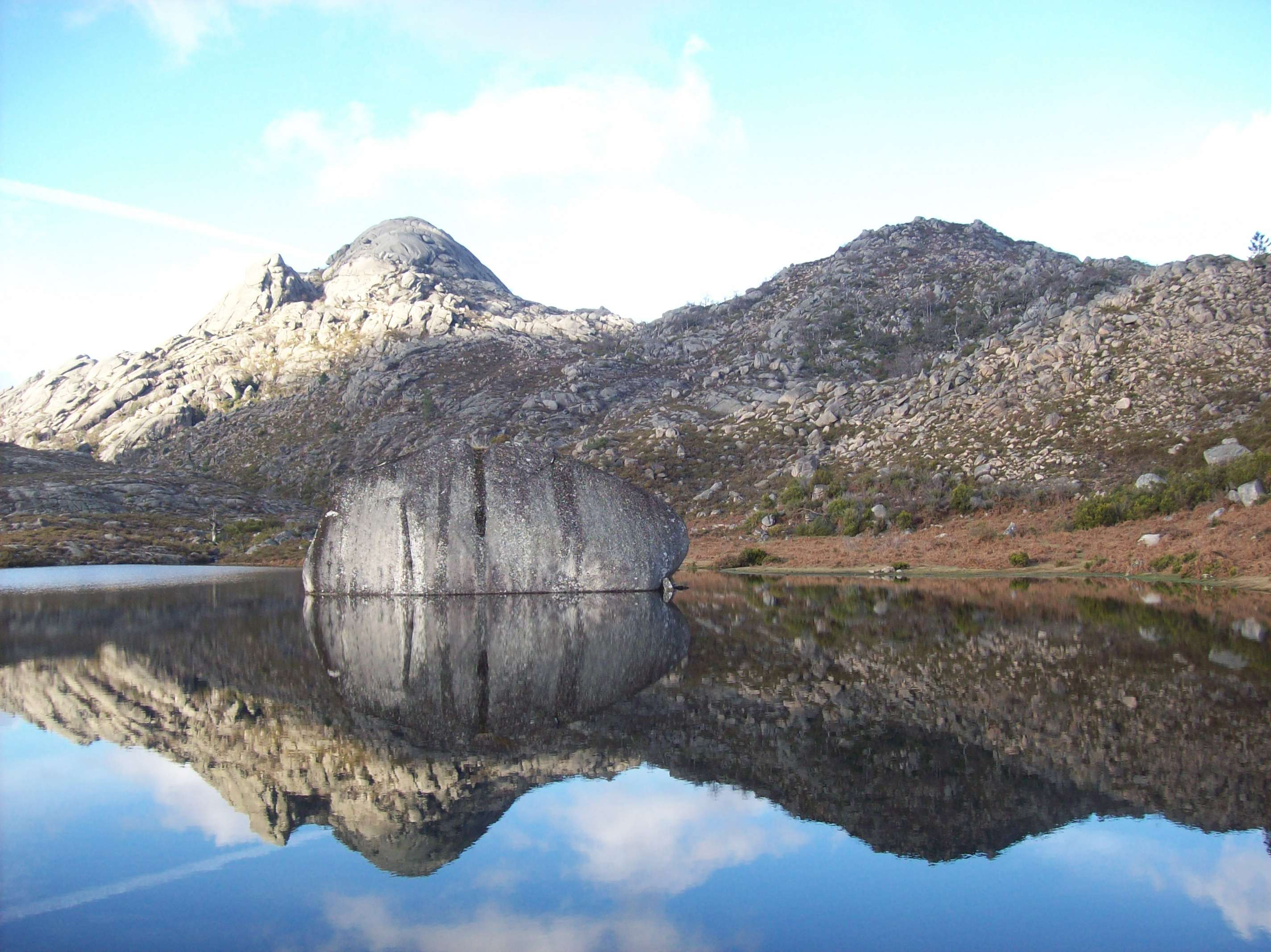 Lagoa sobranceira à aldeia da Peneda, situada na Serra da Peneda (Parque Nacional da Peneda-Gerês), freguesia da Gavieira, município de Arcos de Valdevez. Esta lagoa descarrega alimenta a Cascata da Peneda. This is a photography of a Site of Community Importance in Portugal with the ID: PTCON0001. Natura2000 entry, EEA entry